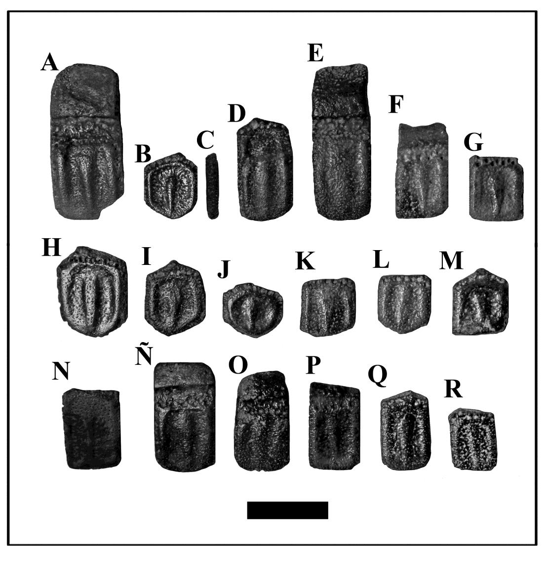 Los osteodermos comprenden el material tipo, los paratipos y materiales asignados.